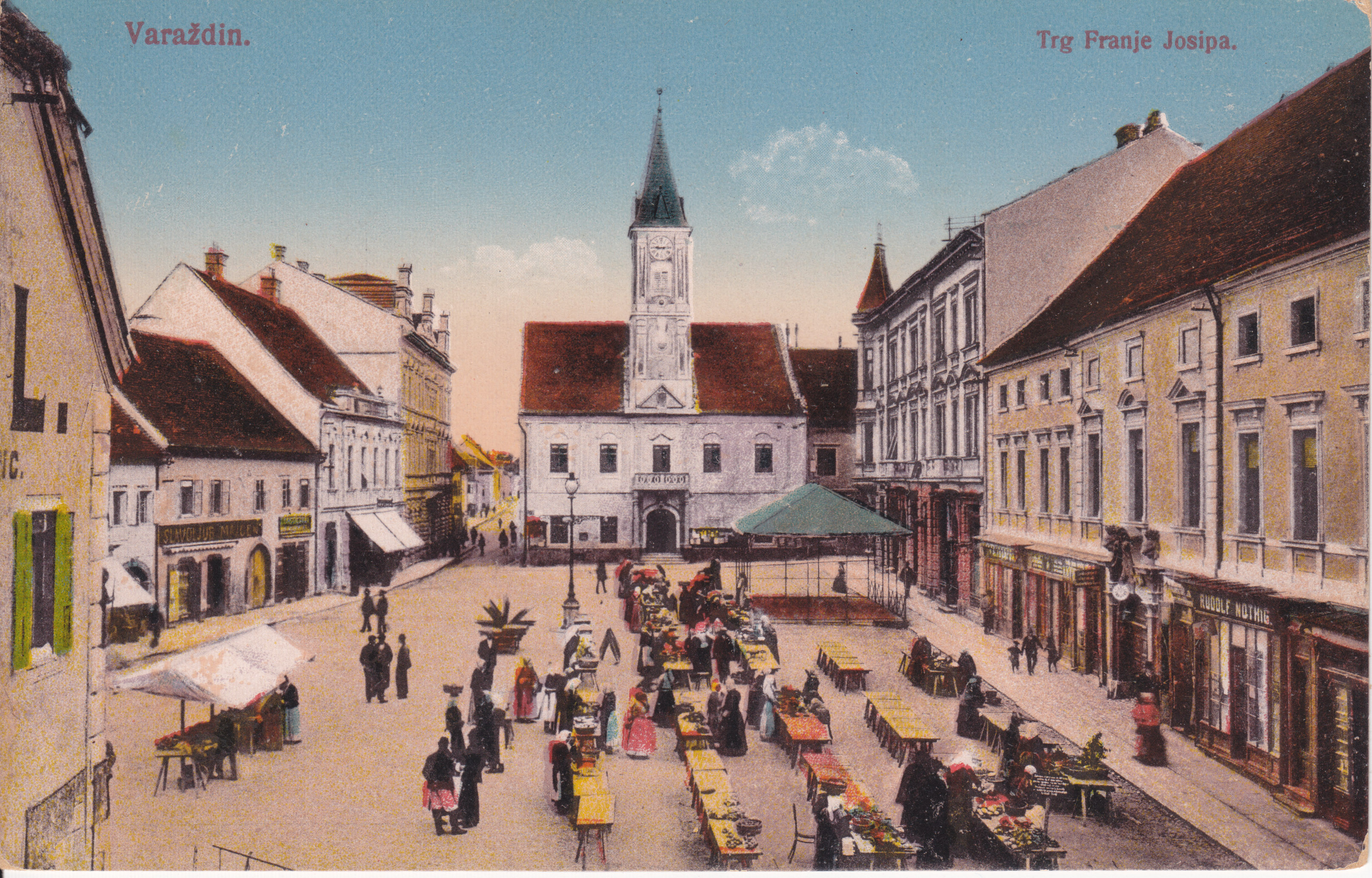 Varasd főtere régi képeslapon